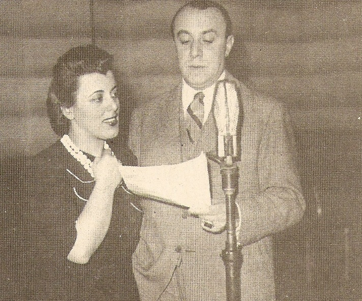 Actores de Radioteatro Silvio Spaventa y Susy Kent